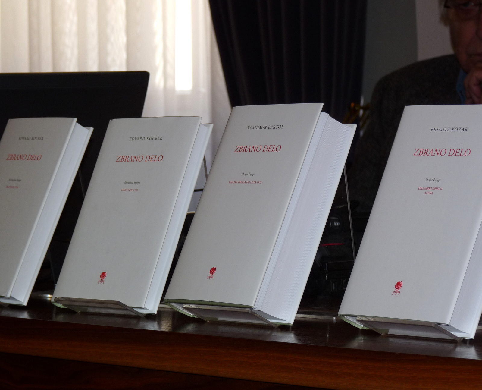 Zbrana dela slovenskih pesnikov in pisateljev